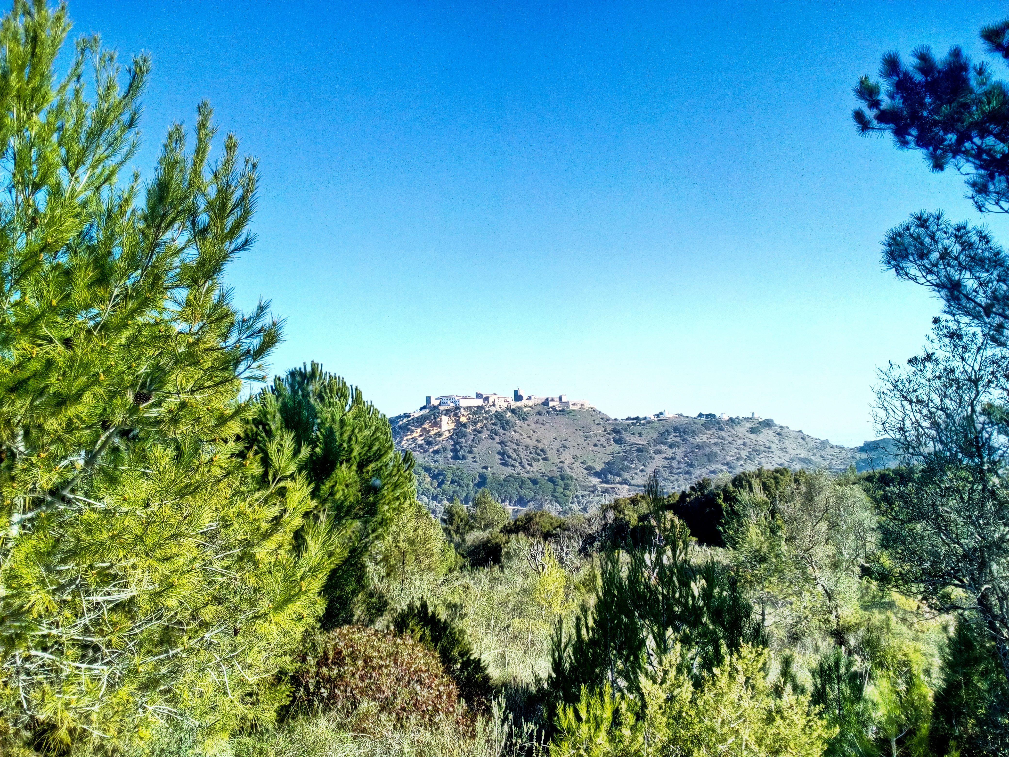 Vista de Palmela